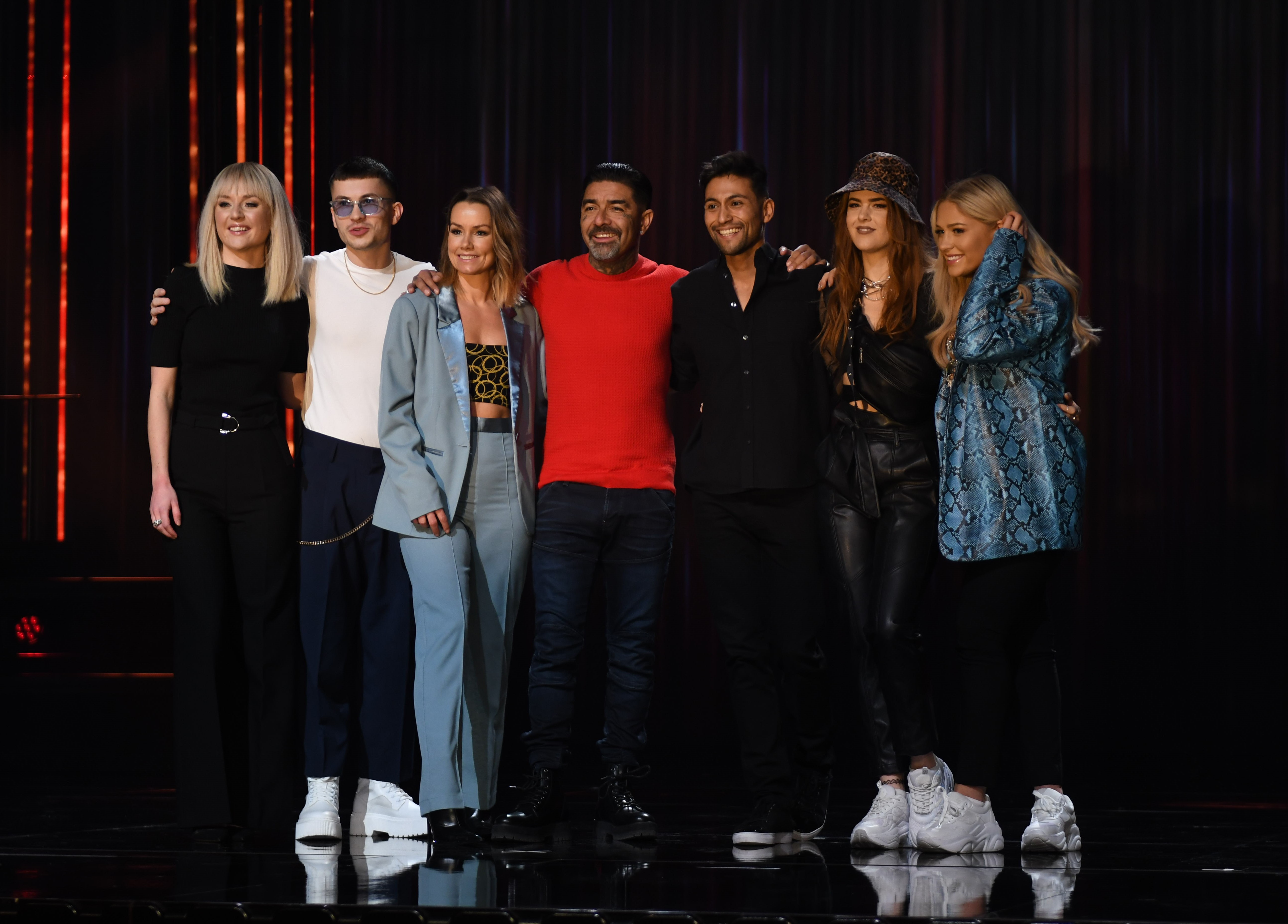 Melodifestivalen 2020, Deltävling 2, Scandinavium, Göteborg, presskonferens, Klara Hammarström, Dotter, Mendez ft. Alvaro Estrella, Linda Bengtzing, Paul Rey, Anna Bergendahl